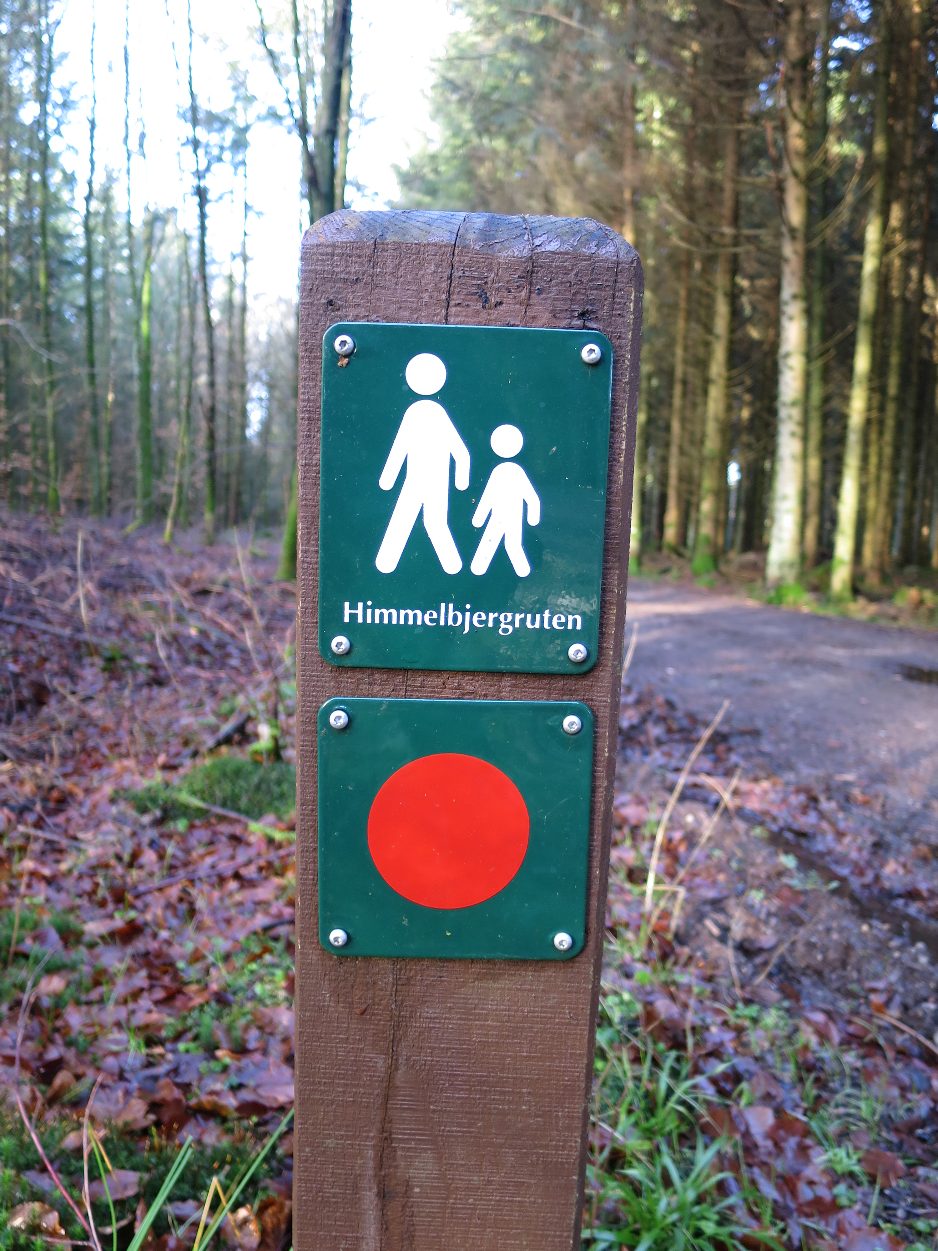 Himmelbjergruten er afmærket med røde prikker og pile.